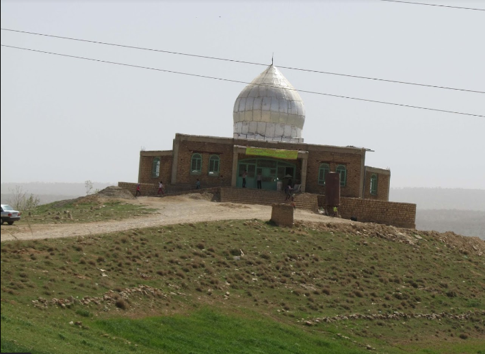 امامزاده پیرحمزه آسمان اباد